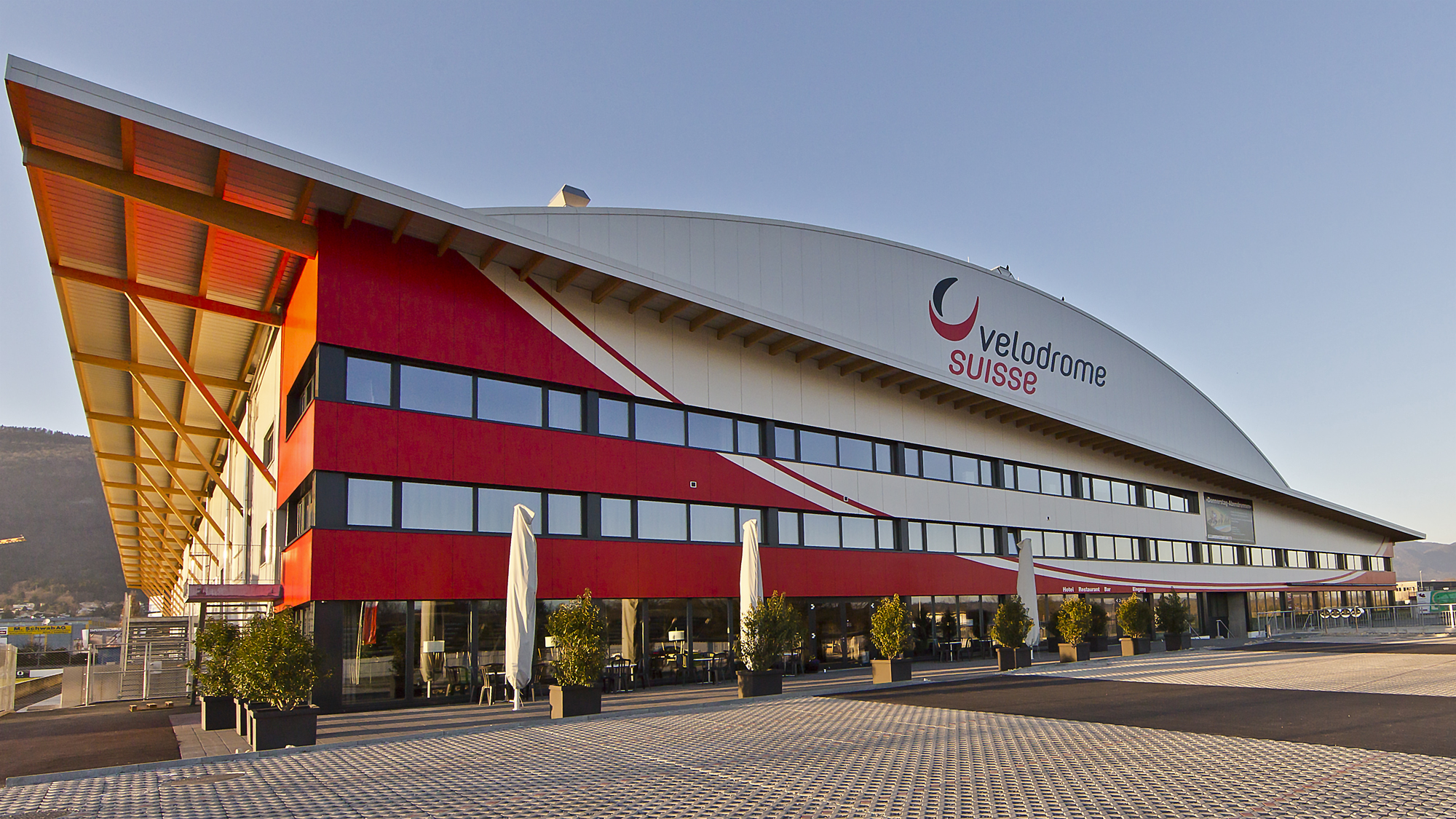 Aussenansicht auf das Velodrome Suisse in Grenchen